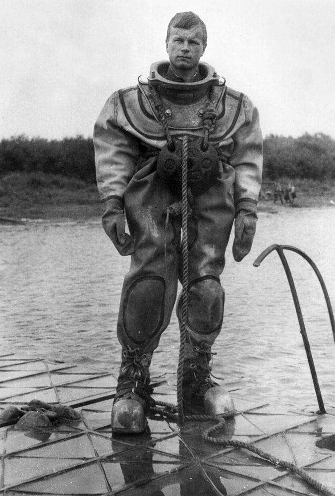 Tuukrikostüüm 3-poldine BP-3. 1968.